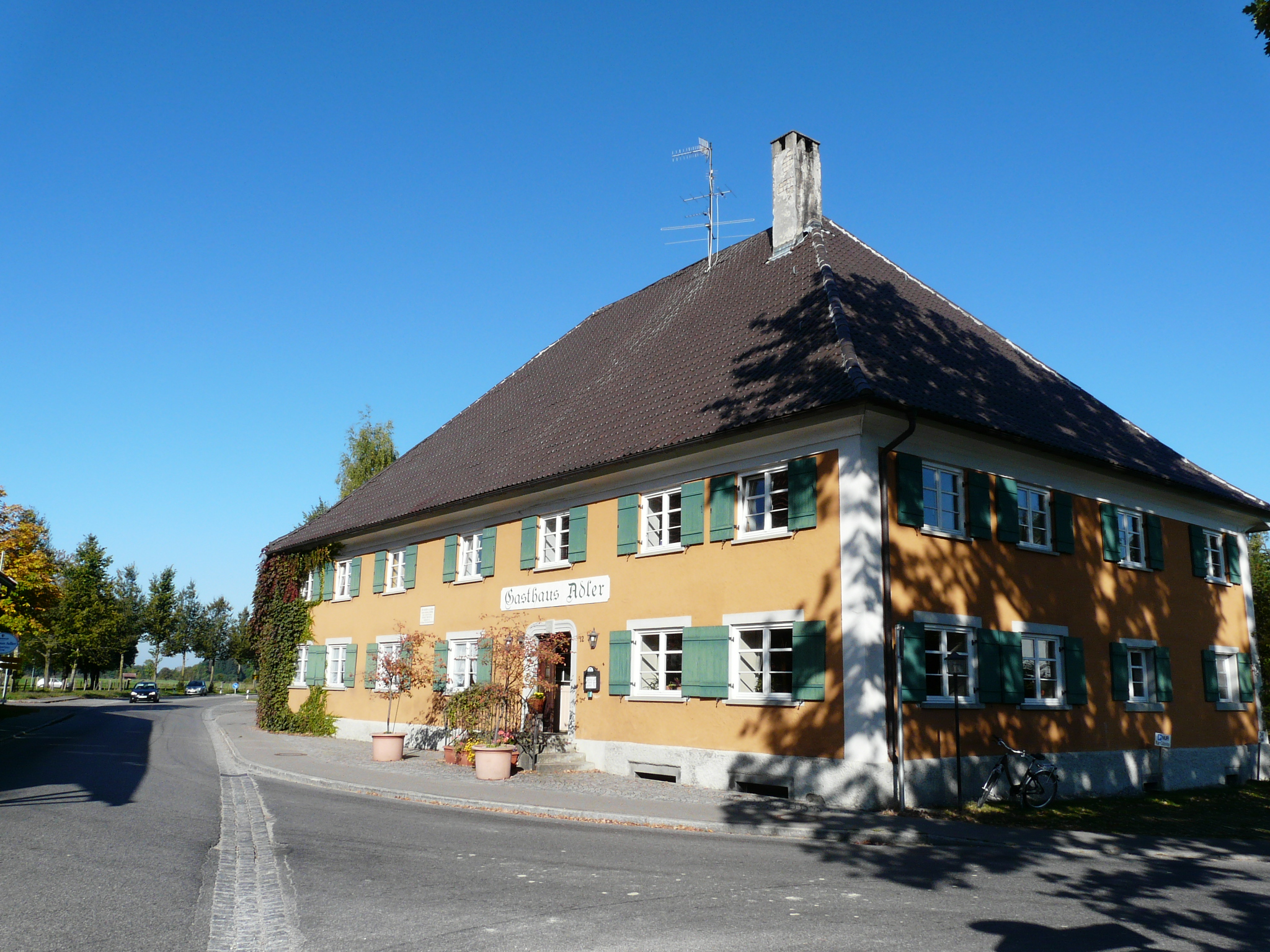 Gasthof Adler in Schönau, Grünenbach